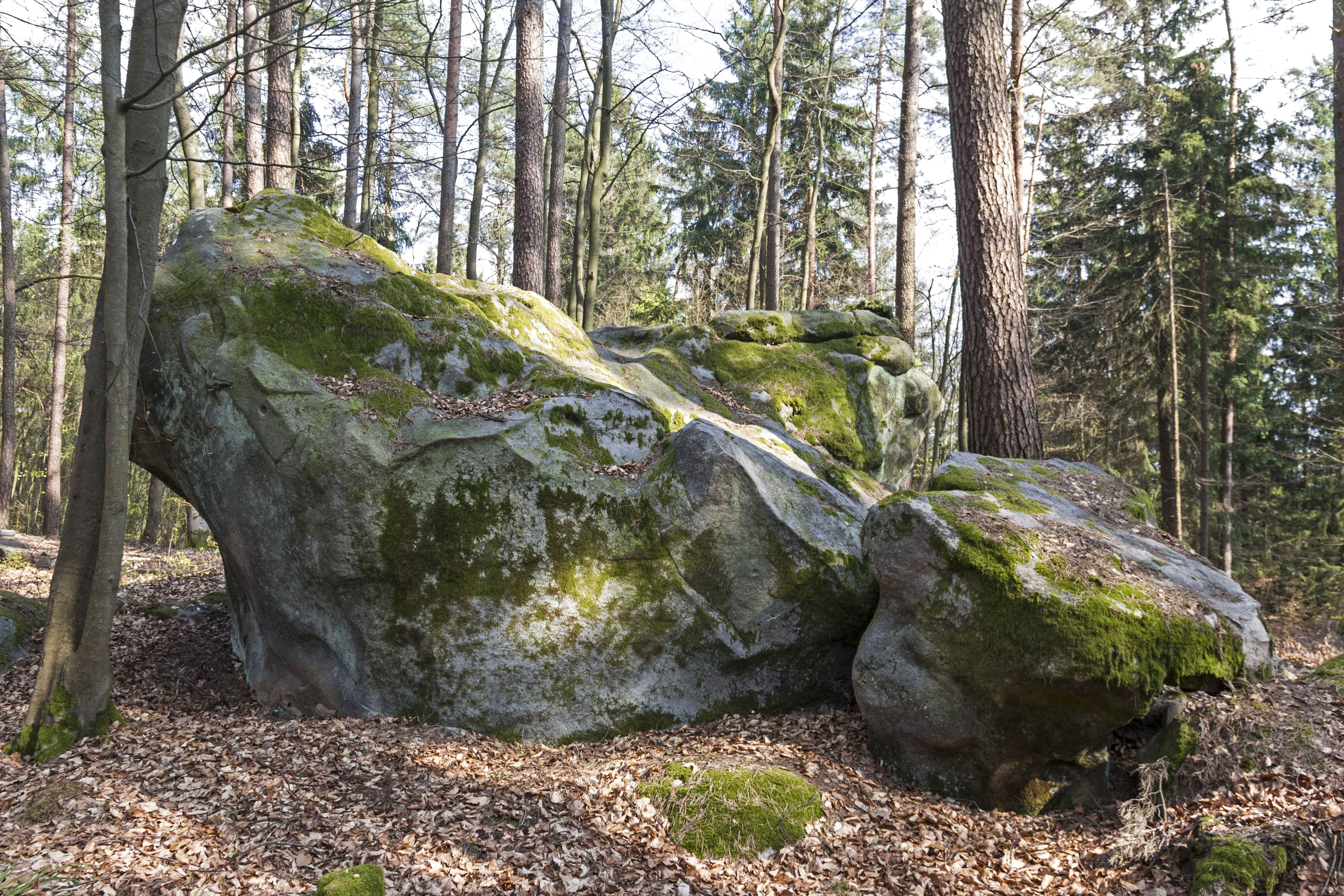 Kallmünzer, Zyprianstein, Geotop, Rinnenbrunn, Naturpark Fränkische Schweiz-Veldensteiner Forst